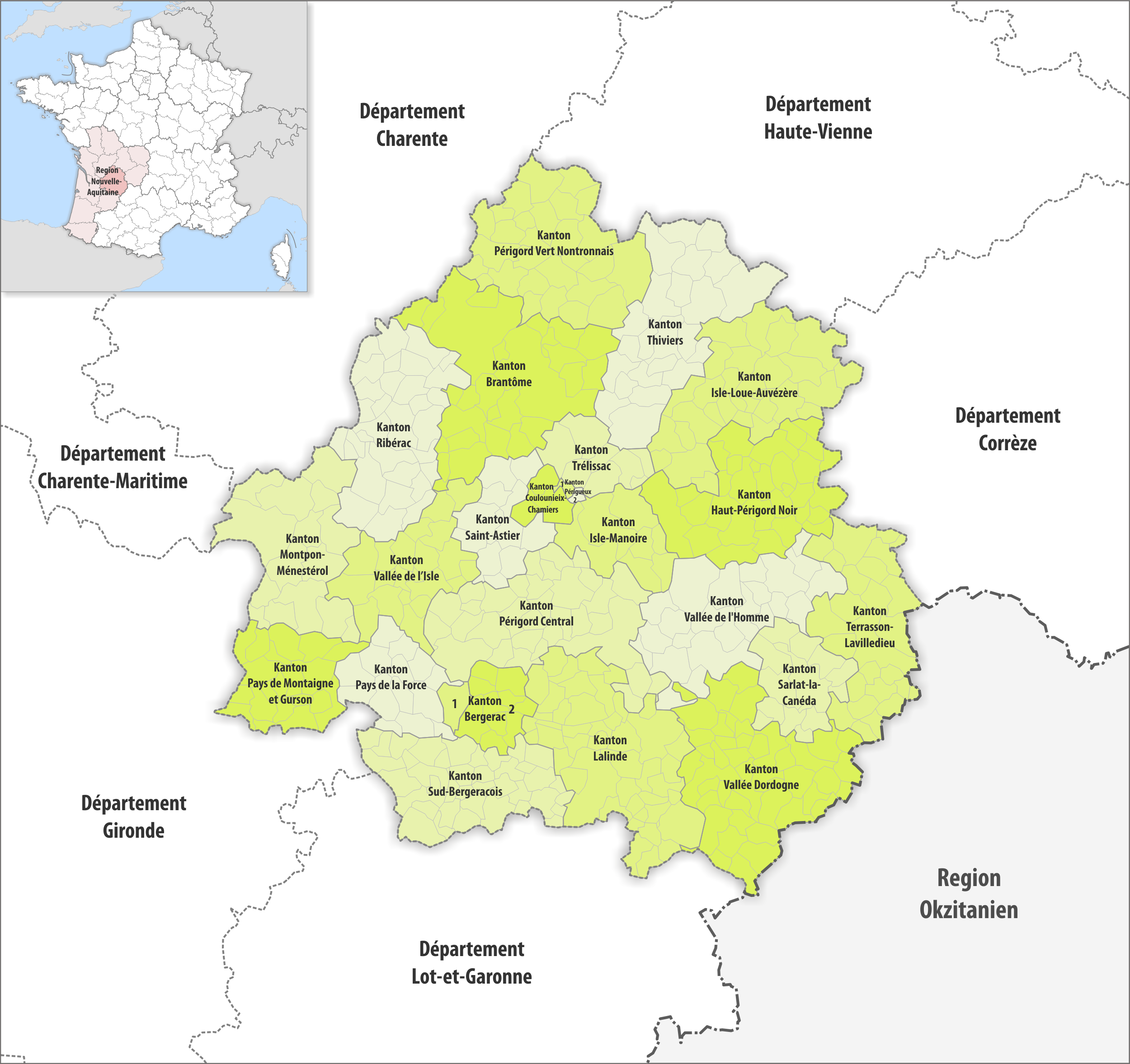 Gemeinden und Kantone im Departement Dordogne